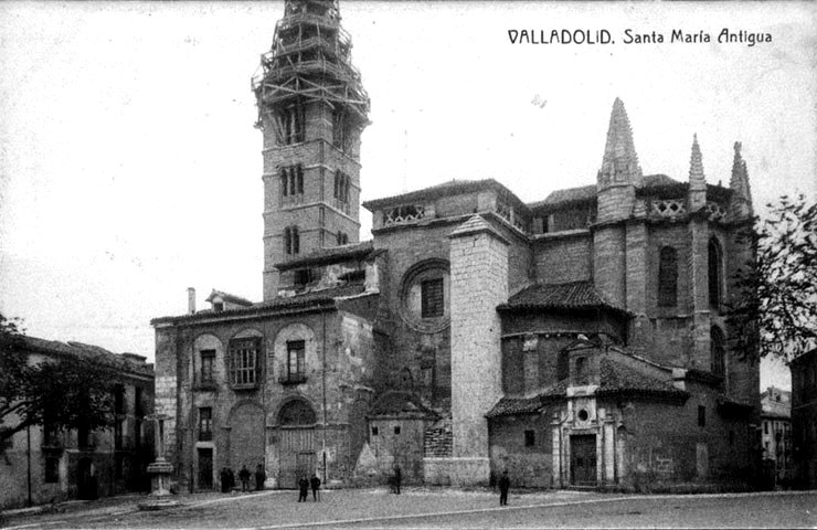 Iglesia de Santa María de la Antigua a principios del S. XX, antes de su derribo y reconstrucción. Se pueden observar varias de las edificciones adosadas, como la casa rectoral de hacia 1500, con un mirador del siglo XIX, la sacristía y capilla de Nuestra Señora de la Soledad y Ánimas, con su portada barroca de piedra.